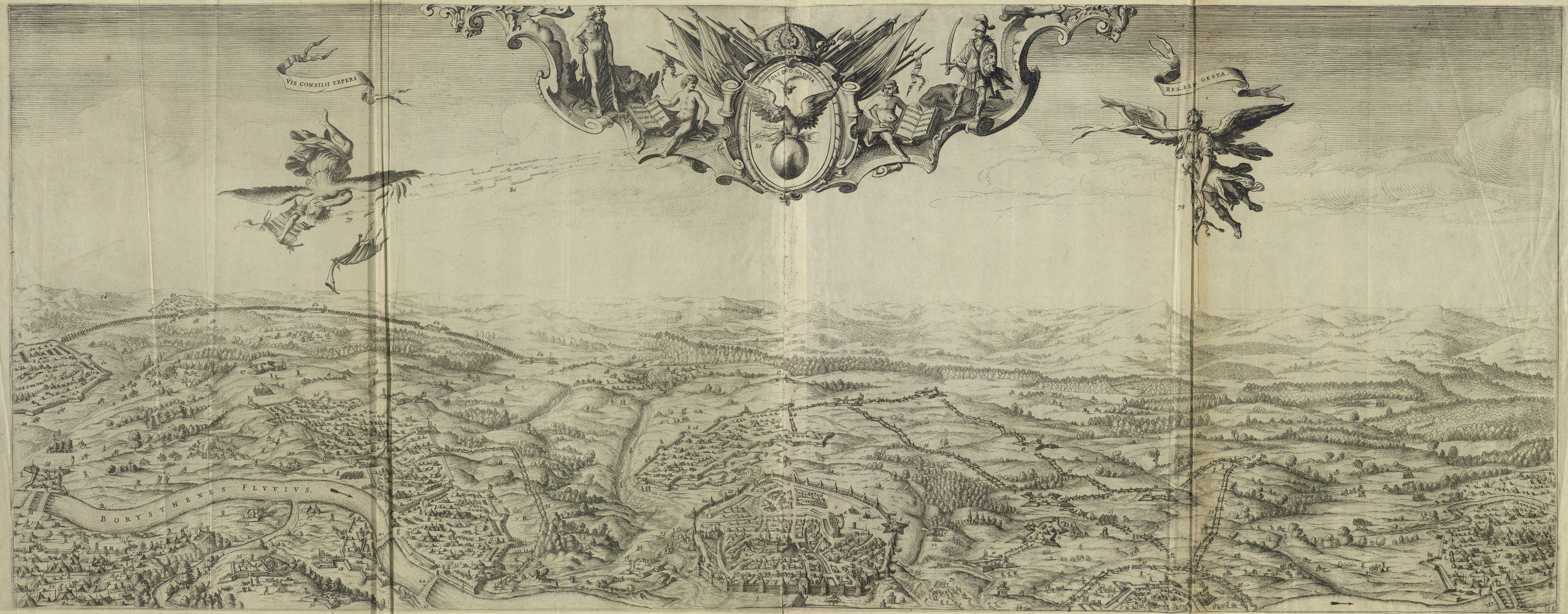 Беларуская (тарашкевіца): Смаленск (Smalensk). Плян места